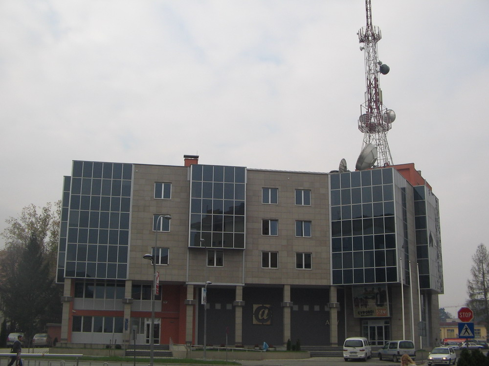 Alternativna_televizija